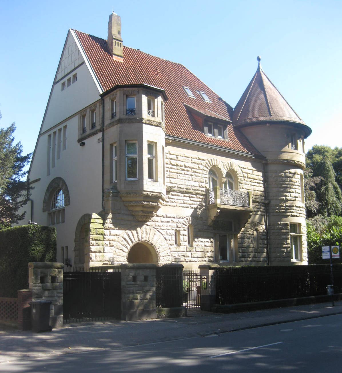 Unternehmervilla von Alexander Cazin an der Kreuzschanze Münster im Richardsonian Romanesque Style